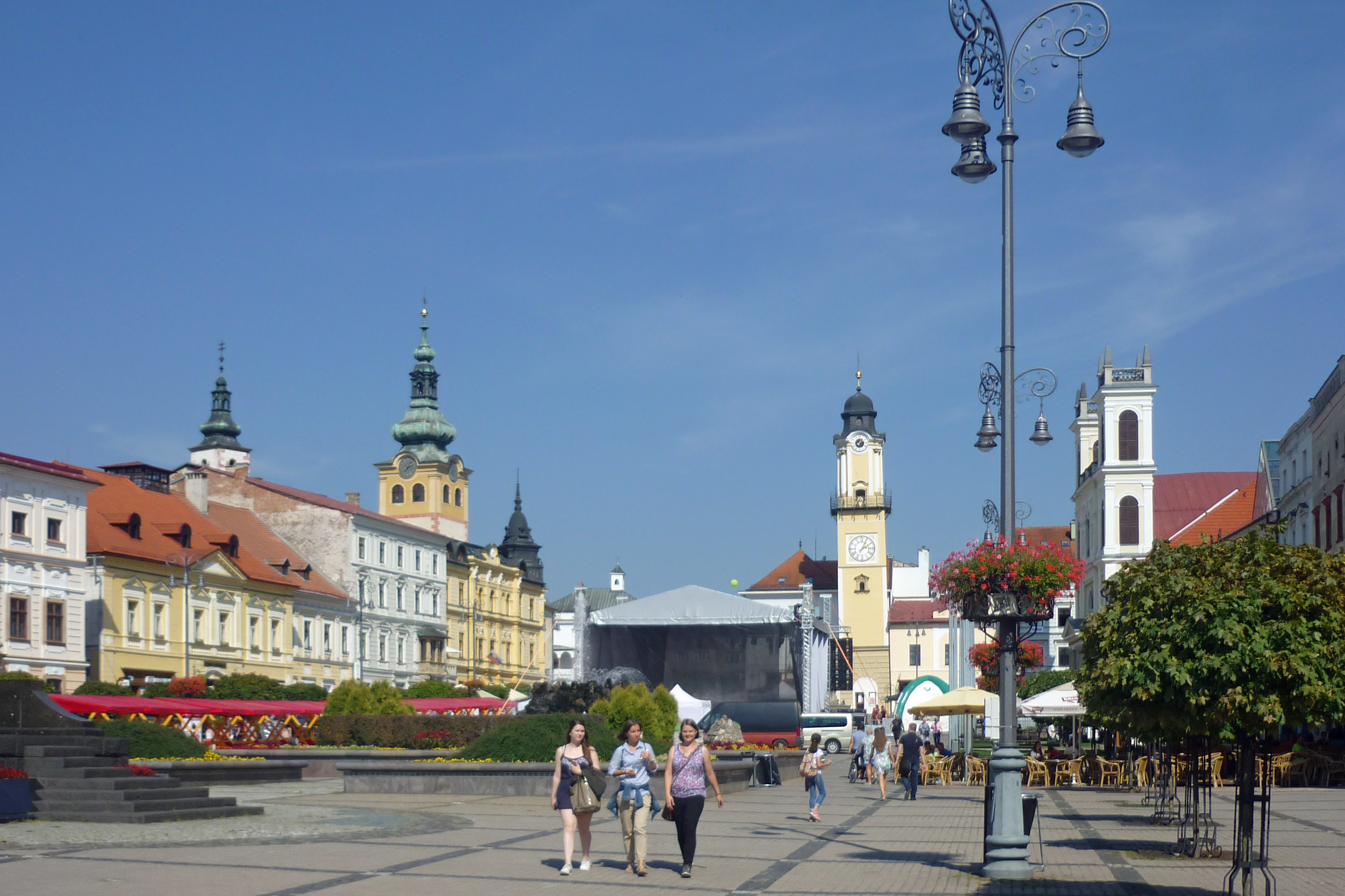 Ringplatz (SNP nám.) in Banská Bystrica (Neusohl) in der Slowakei